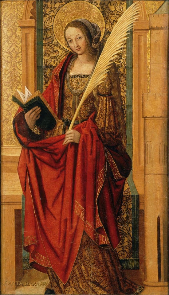 Santa Barbara of Joan Gascó